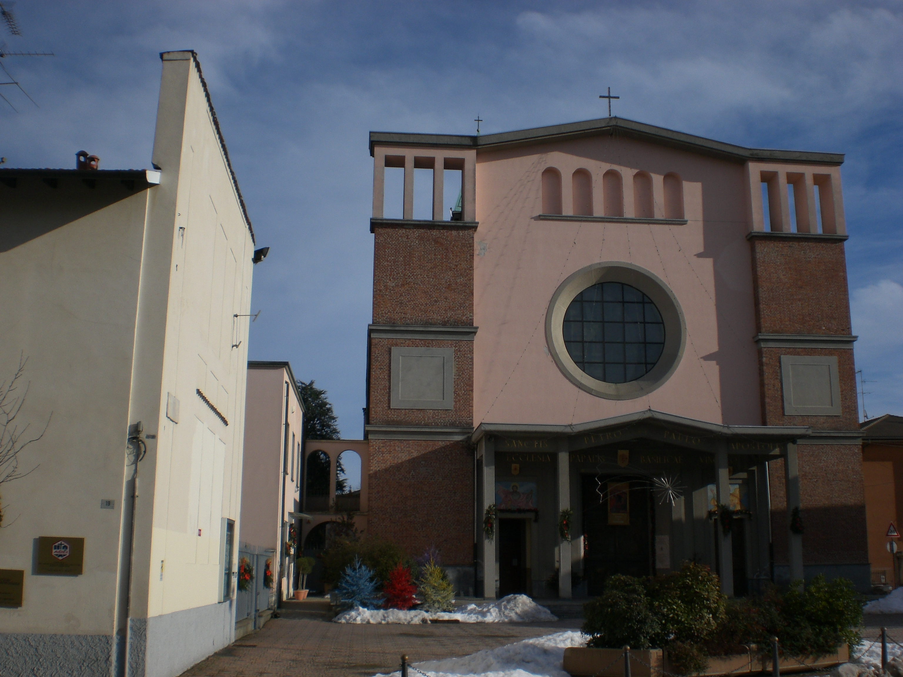 Muro della vecchia chiesa di Borsano, vicino alla chiesa nuova